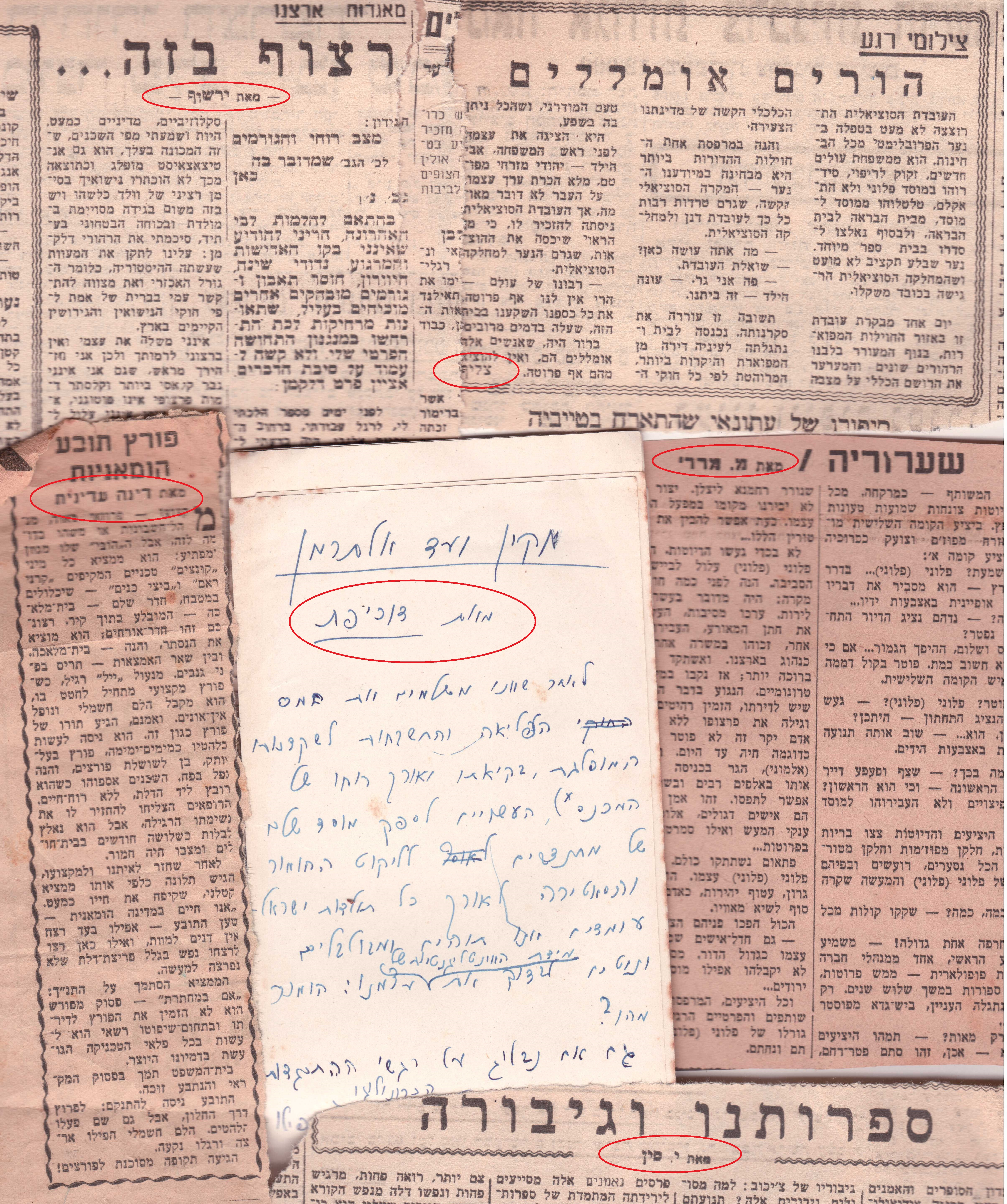 גיזרי עיתונים מתקופות שונות ופתק בכתב ידו של יוסף סערוני.